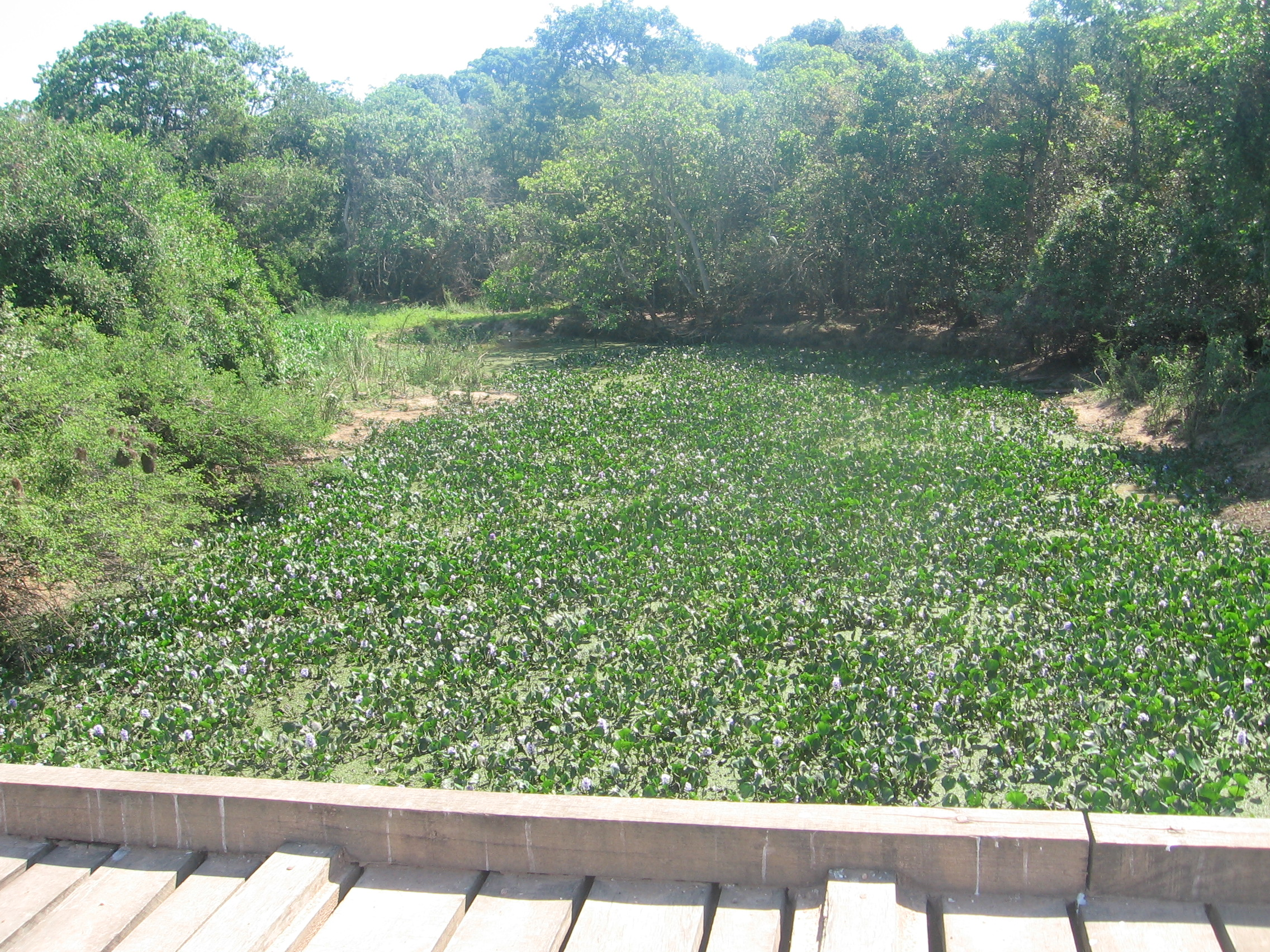 Vista de uma ponte na rodovia transpantaneira